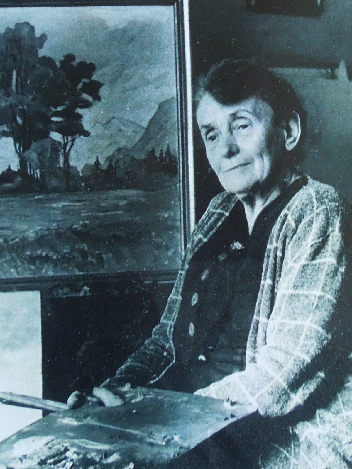 Malerin Gertrud Spitta an Staffelei